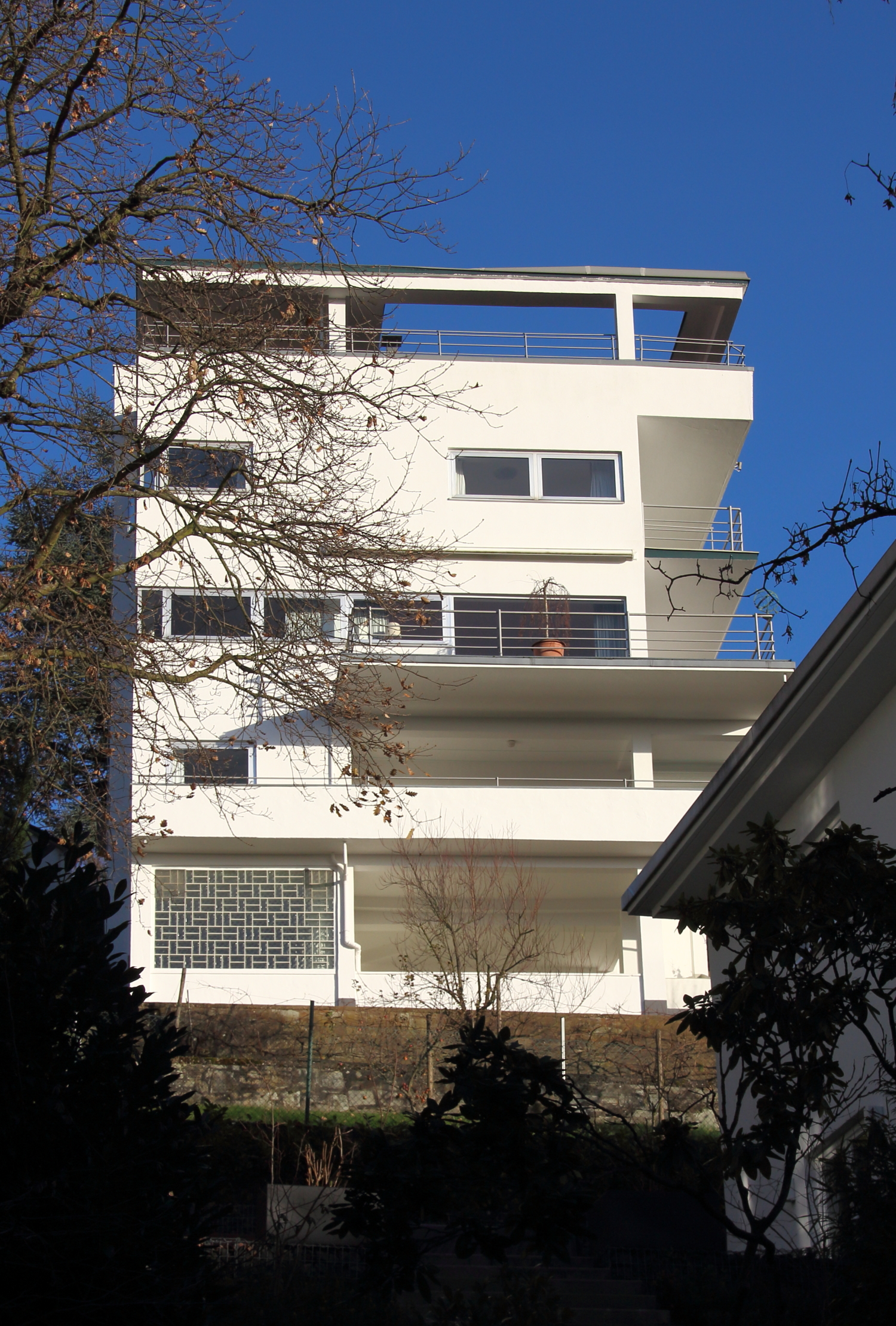 Haus Hoffmann (Talseite), erbaut 1927. Architekt: Johann Wilhelm Lehr. Wiesbaden.